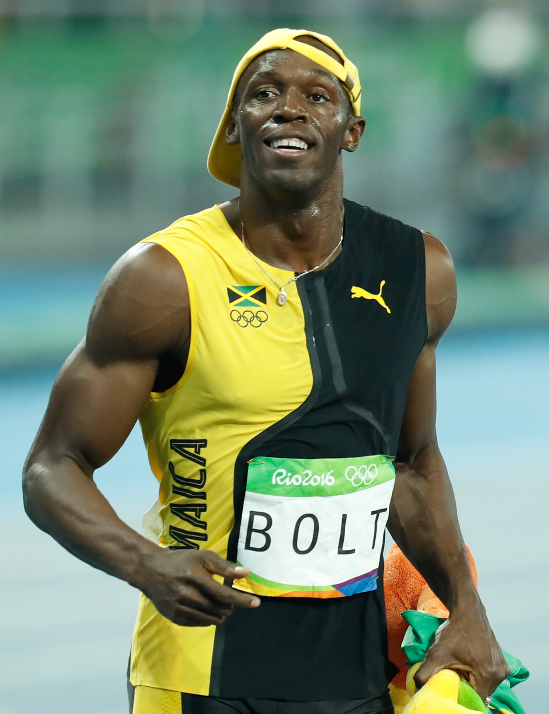 Rio de Janeiro - O jamaicano Usain Bolt, garantiu o ouro e fez história ao conquistar pela terceira vez o título de homem mais rápido do mundo nos 100 metros rasos em uma Olimpíada (Fernando Frazão/Agência Brasil).